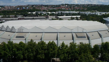 Westansicht Hanns-Martin-Schleyer-Halle in Stuttgart